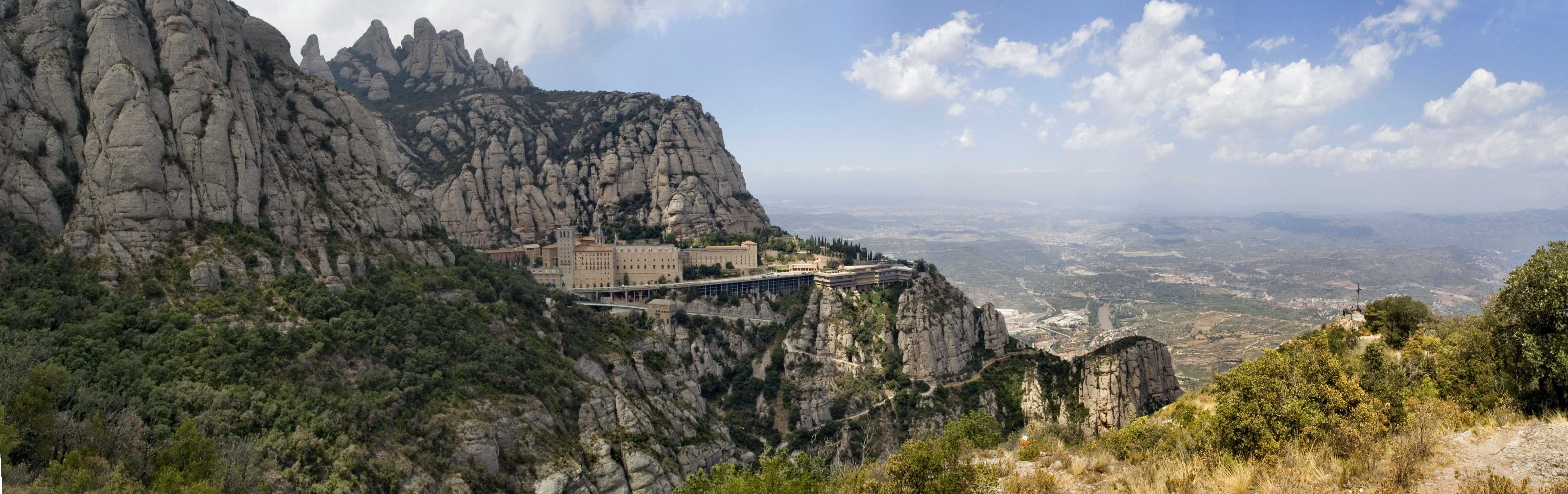 Испания, Каталония, монастырь на горе Монтсеррат (вид с креста Святого Михаила)